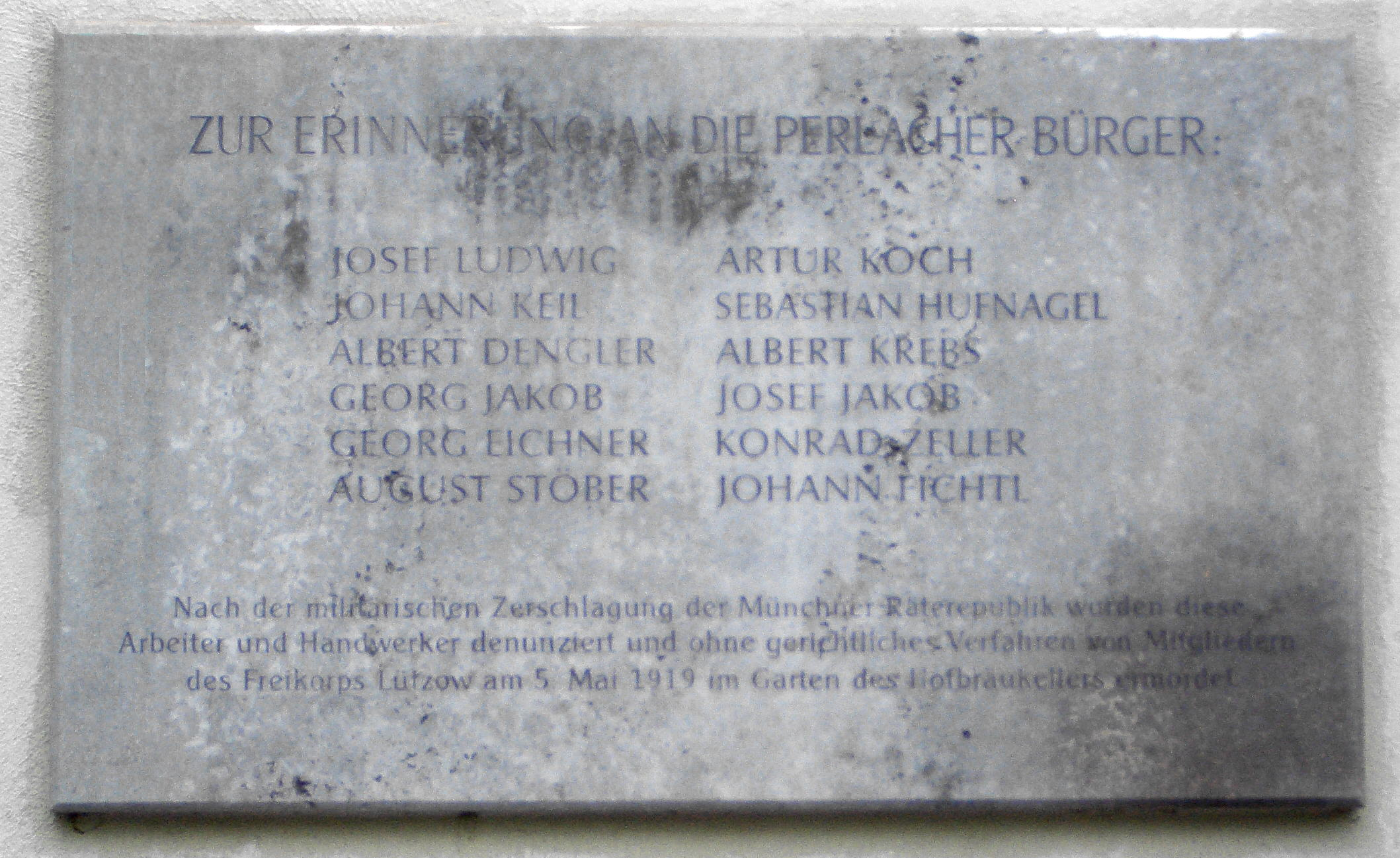 Gedenktafel am Münchner Hfbräukeller